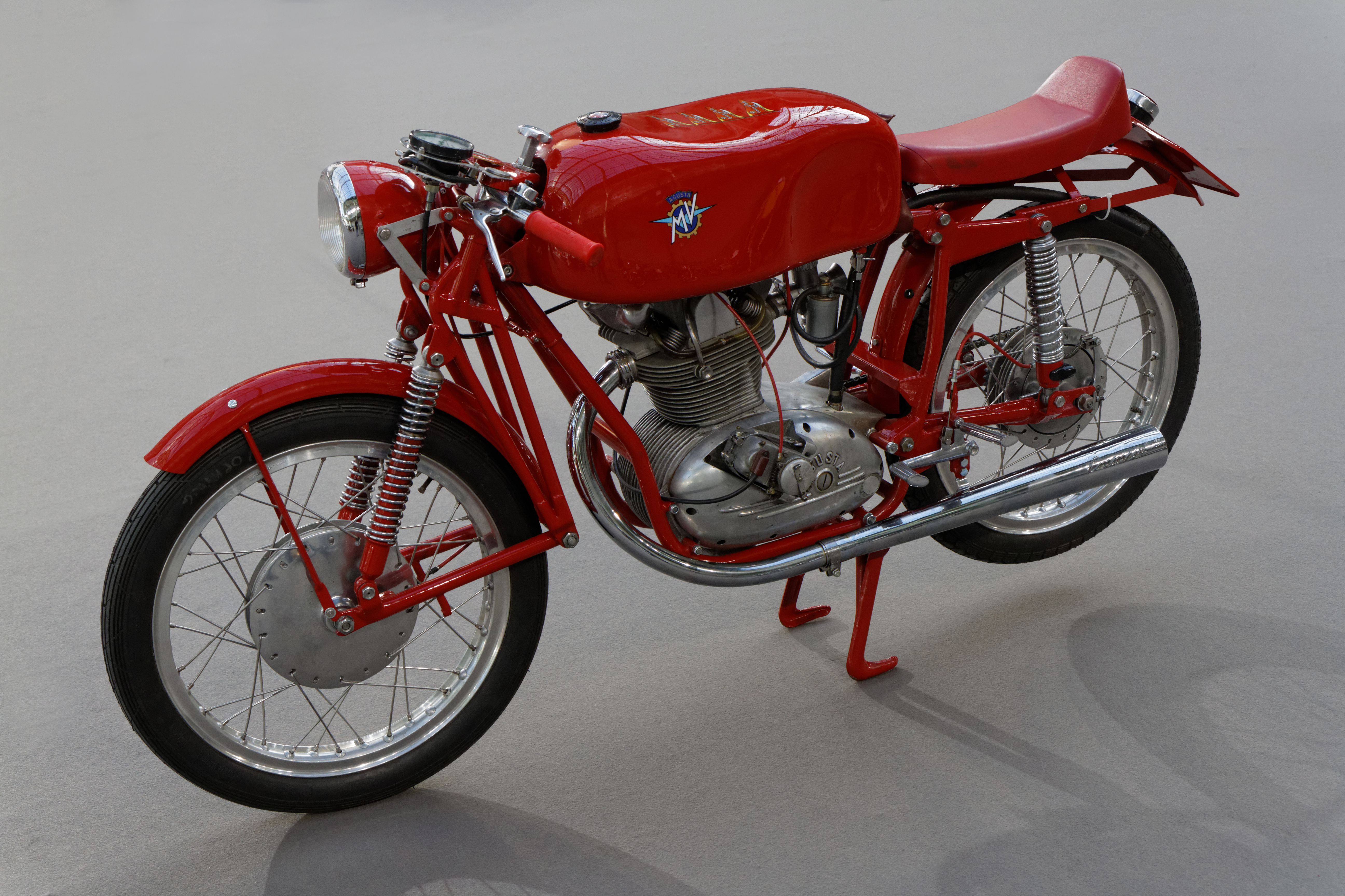 Une MV Agusta 175 CSS Squalo Bialbero Racing Motorcycle au Grand Palais lors de la vente Bonhams en février 2014.